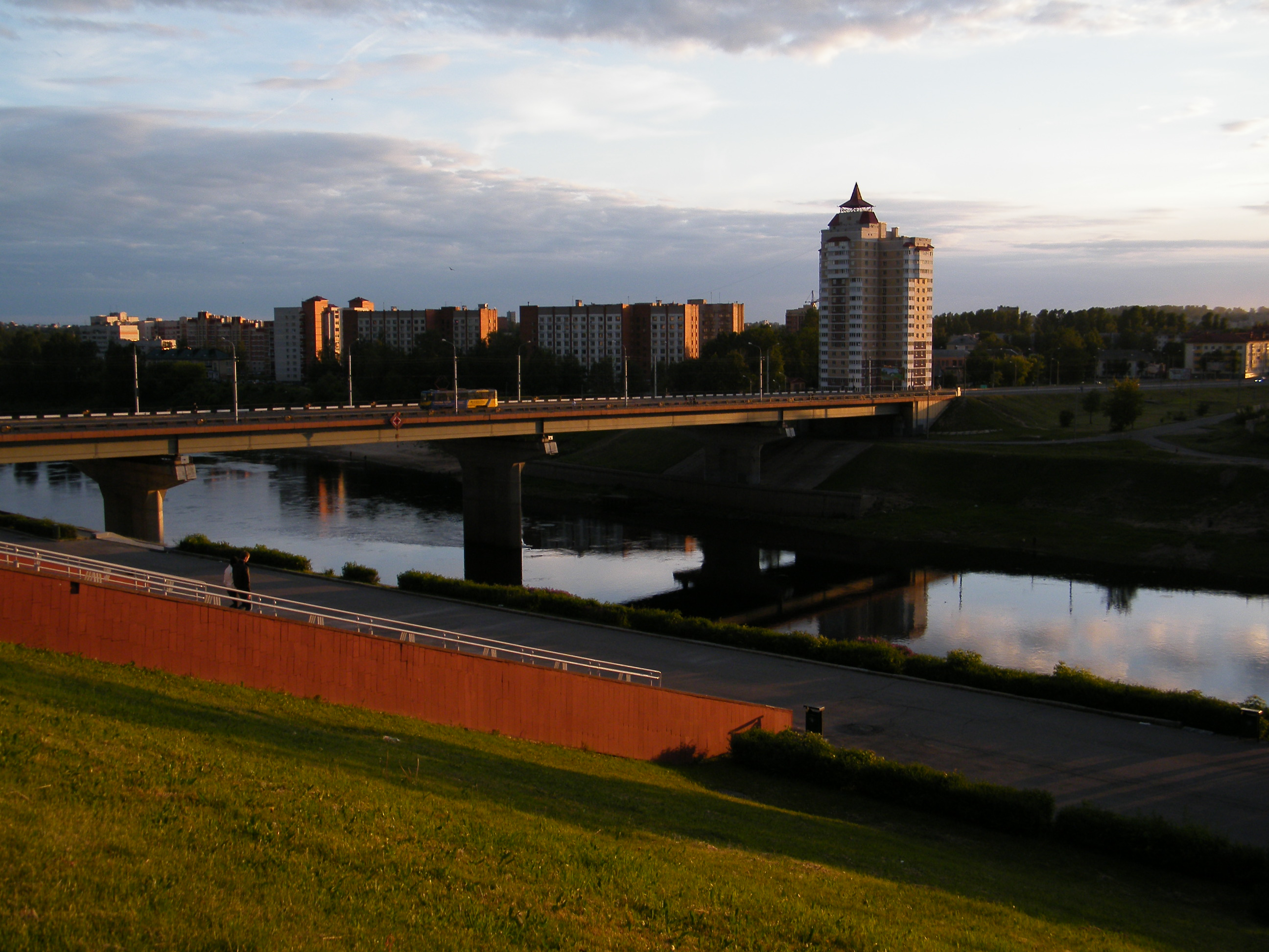 Вечер над Двиной.